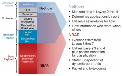 Монгол: Нэтфлов протоколоор рутерийн ачааллыг хянах боломжтой боловч энэ нь түвшин 2-с түвшин 4 хүртэлх урсгалыг хянадаг. Харин NBAR протокол нь түвшин 3-с түвшин 7 хүртэлх урсгалыг хянадагаараа давуу талтай. Энэхүү зурганд нэвфлов болон NBAR протокол 2-н ялгааг харуулсан.